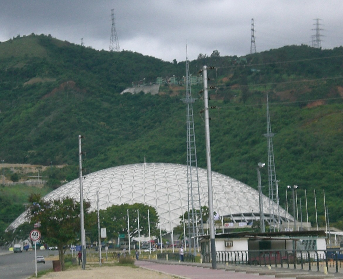 Caracas Polyhedron, Caracas, Venezuela